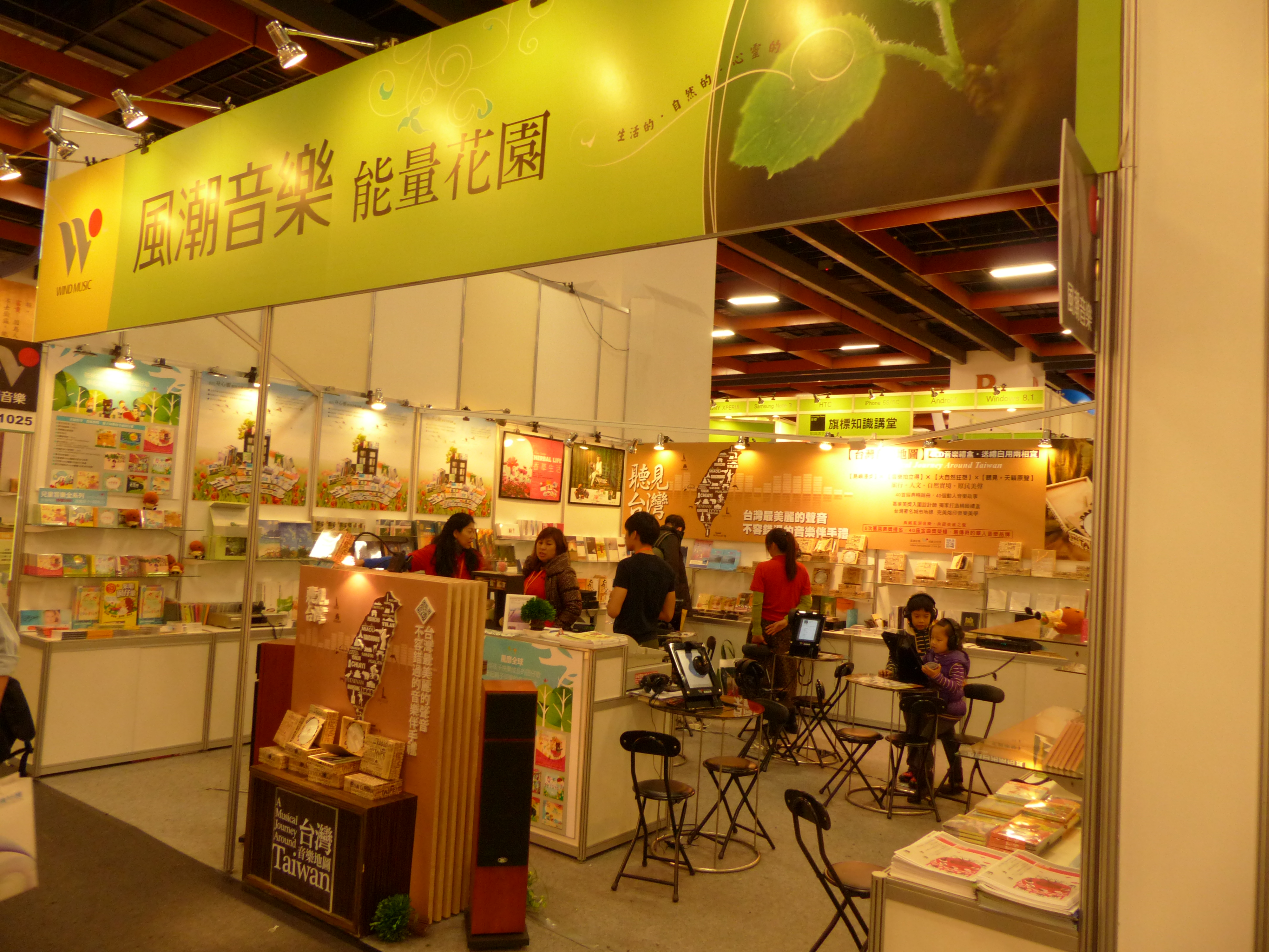 中文（台灣）: 第22屆臺北國際書展，世貿一館風潮音樂攤位。